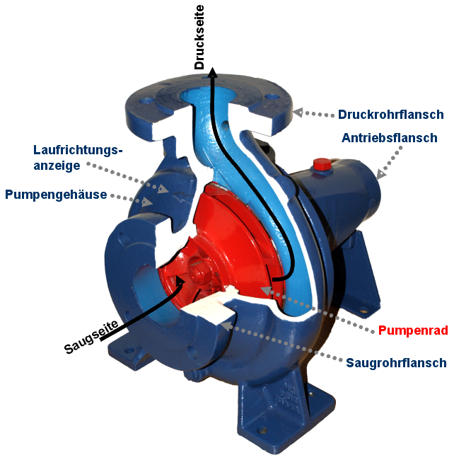 Schnitt einer Kreiselpumpe mit Bezeichnungen. Modell steht im Wasserwerk Delmenhorst.